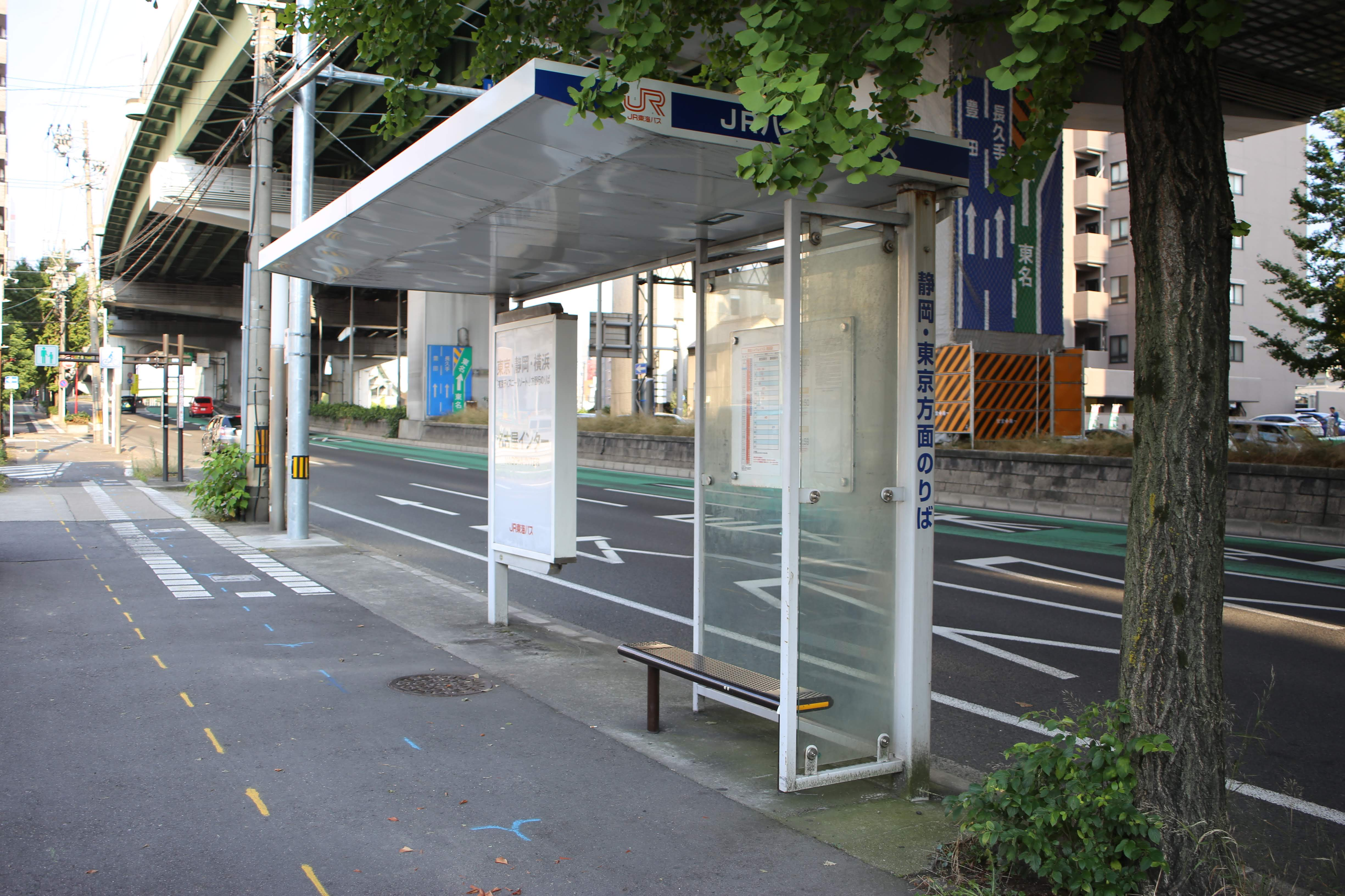 名古屋市名東区本郷二丁目 JR東海バス名古屋インター停留所